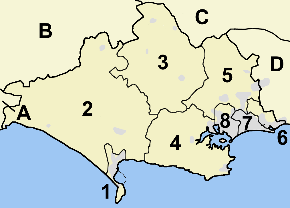 Dorset